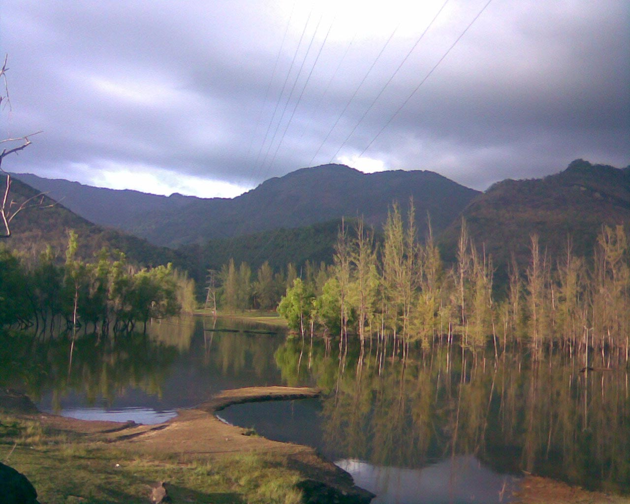 Thonikadavu